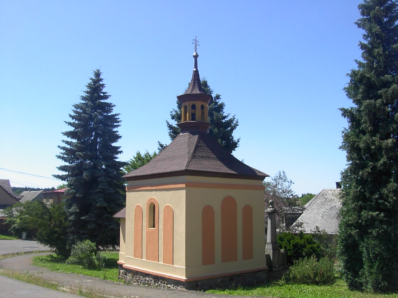 Chapelle in Cheznovice